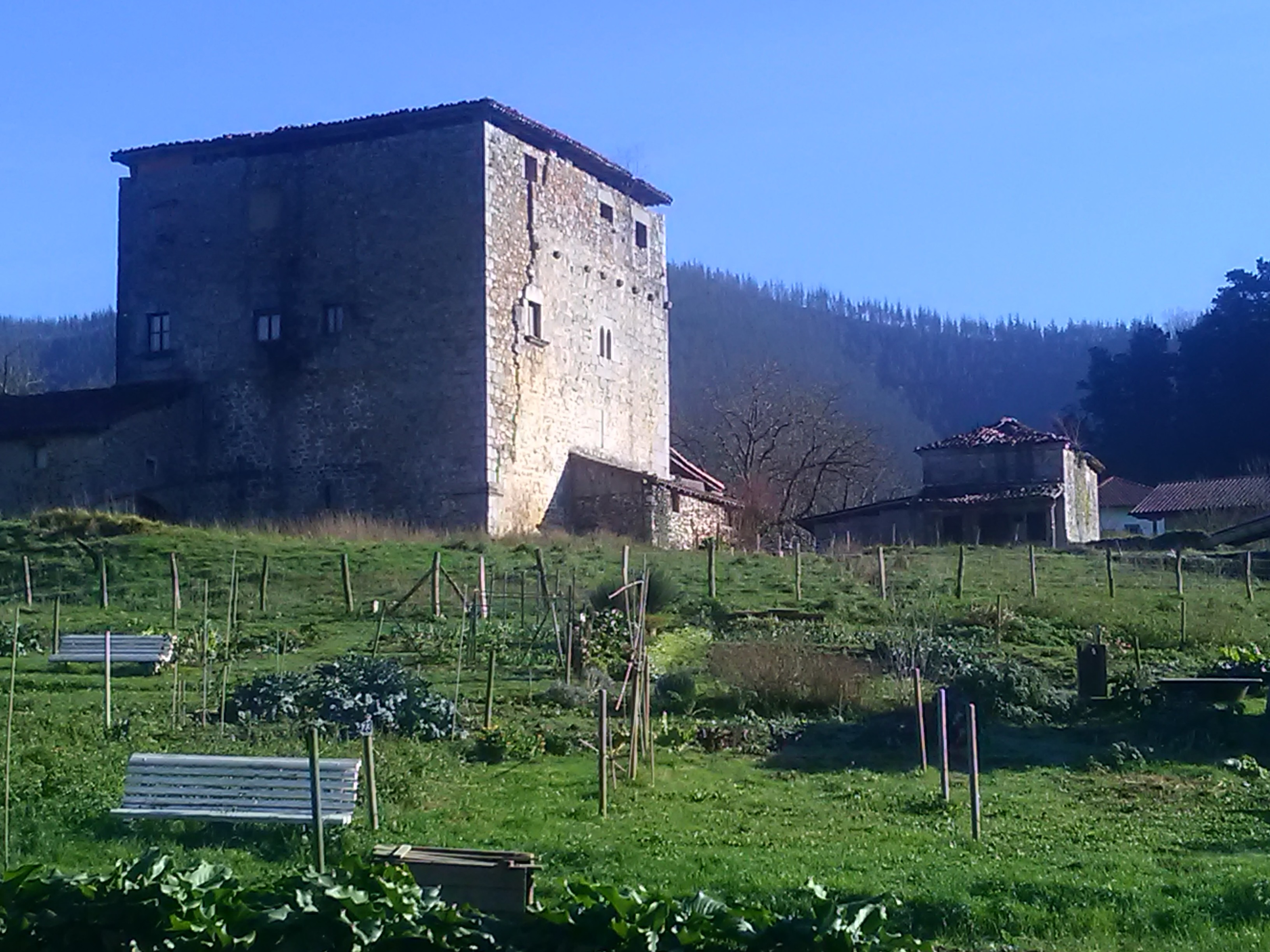 Barroeta dorretxea (Markina-Xemein), eta eskuin aldean San Joakin eta Santa Ana baseliza.